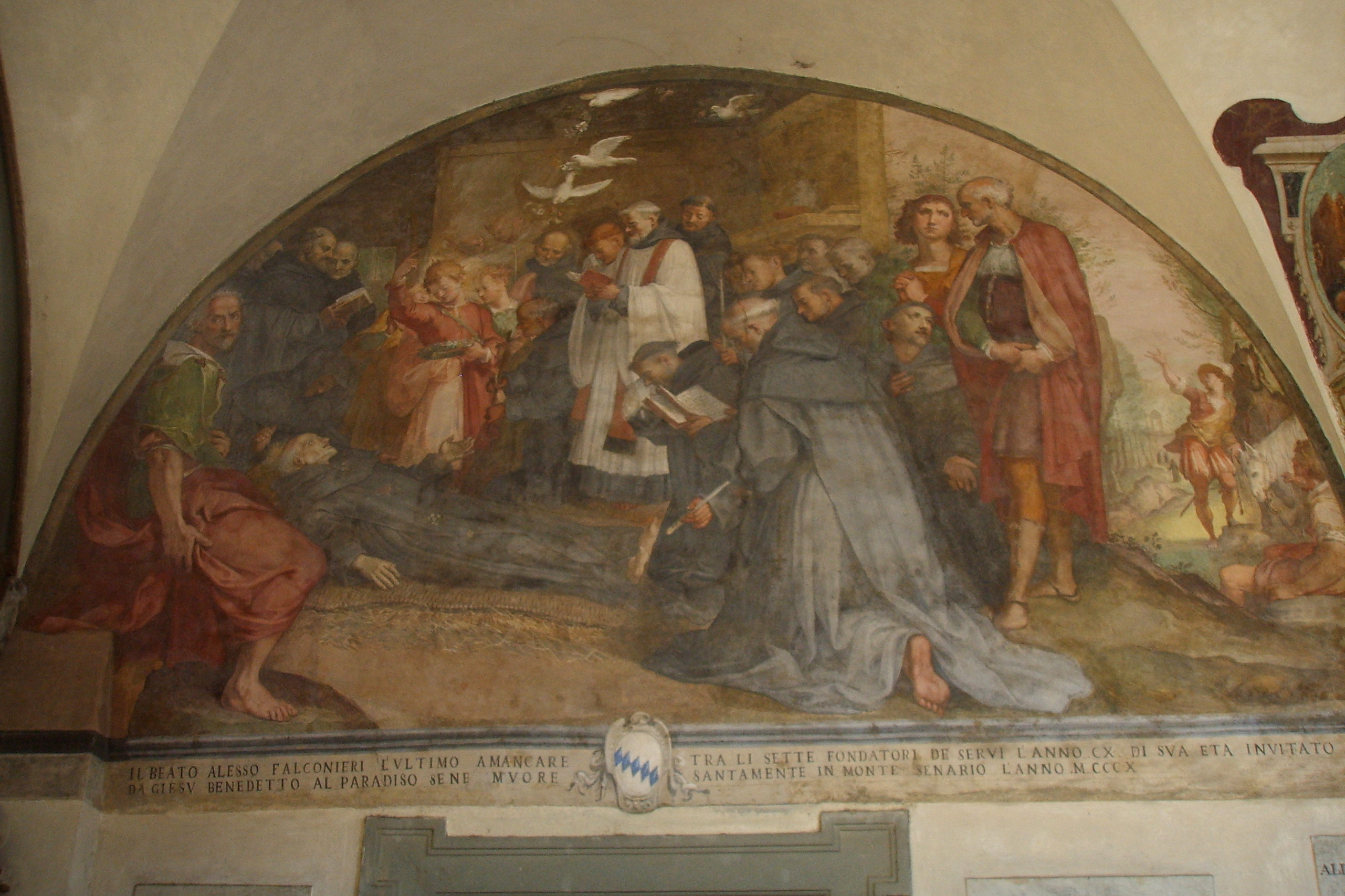 Santissima annunziata chiostro grande bernardino_poccetti,_morte_di_s.alessio_falconieri in Florence, italy